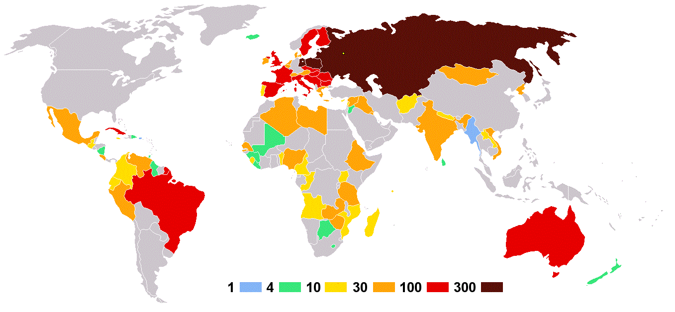 Olympische Sommerspiele 1980 — Anzahl der Athleten